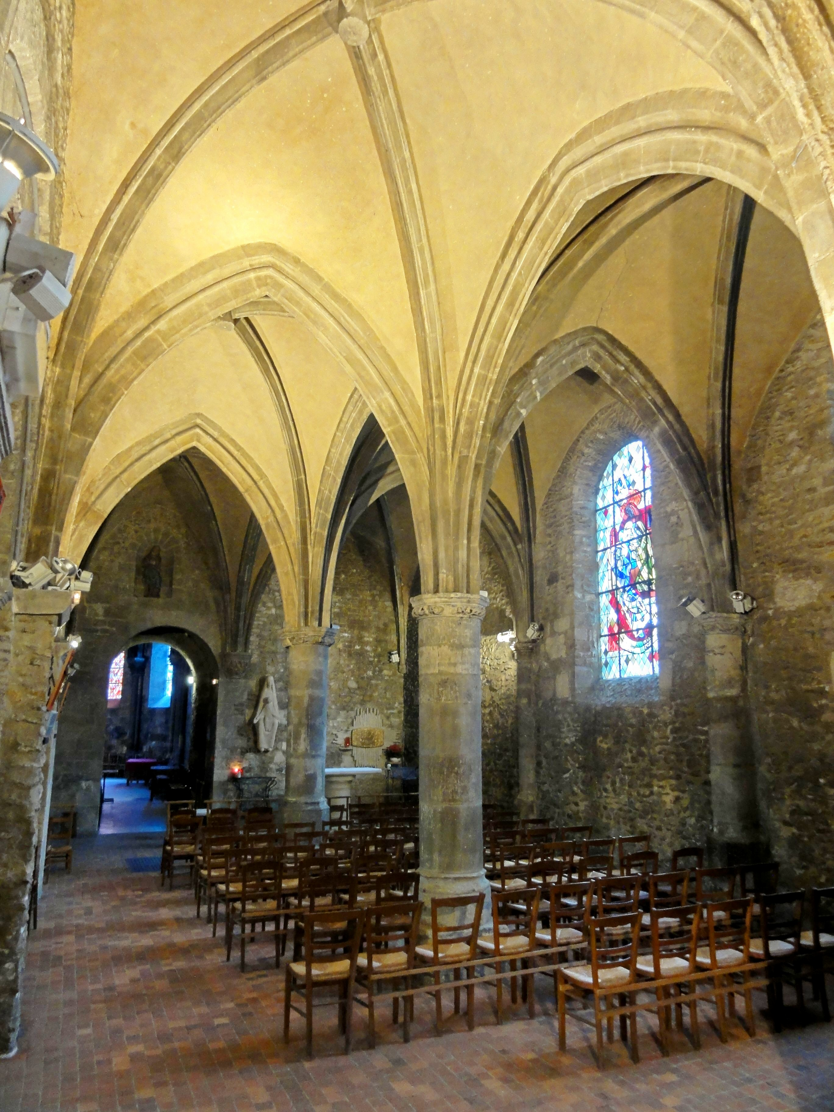 Chapelle gothique du sud, premier vaisseau (nord), vue vers l'est.